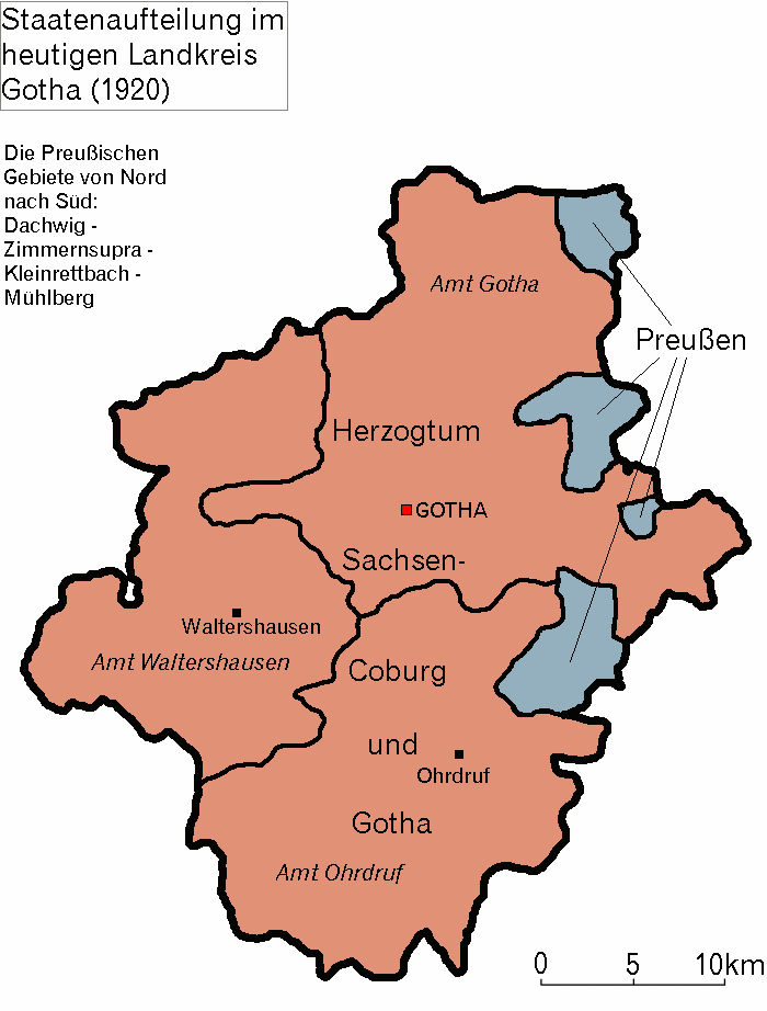 Staatenaufteilung des Landkreis Gotha vor 1922. Quelle: selbst gezeichnet